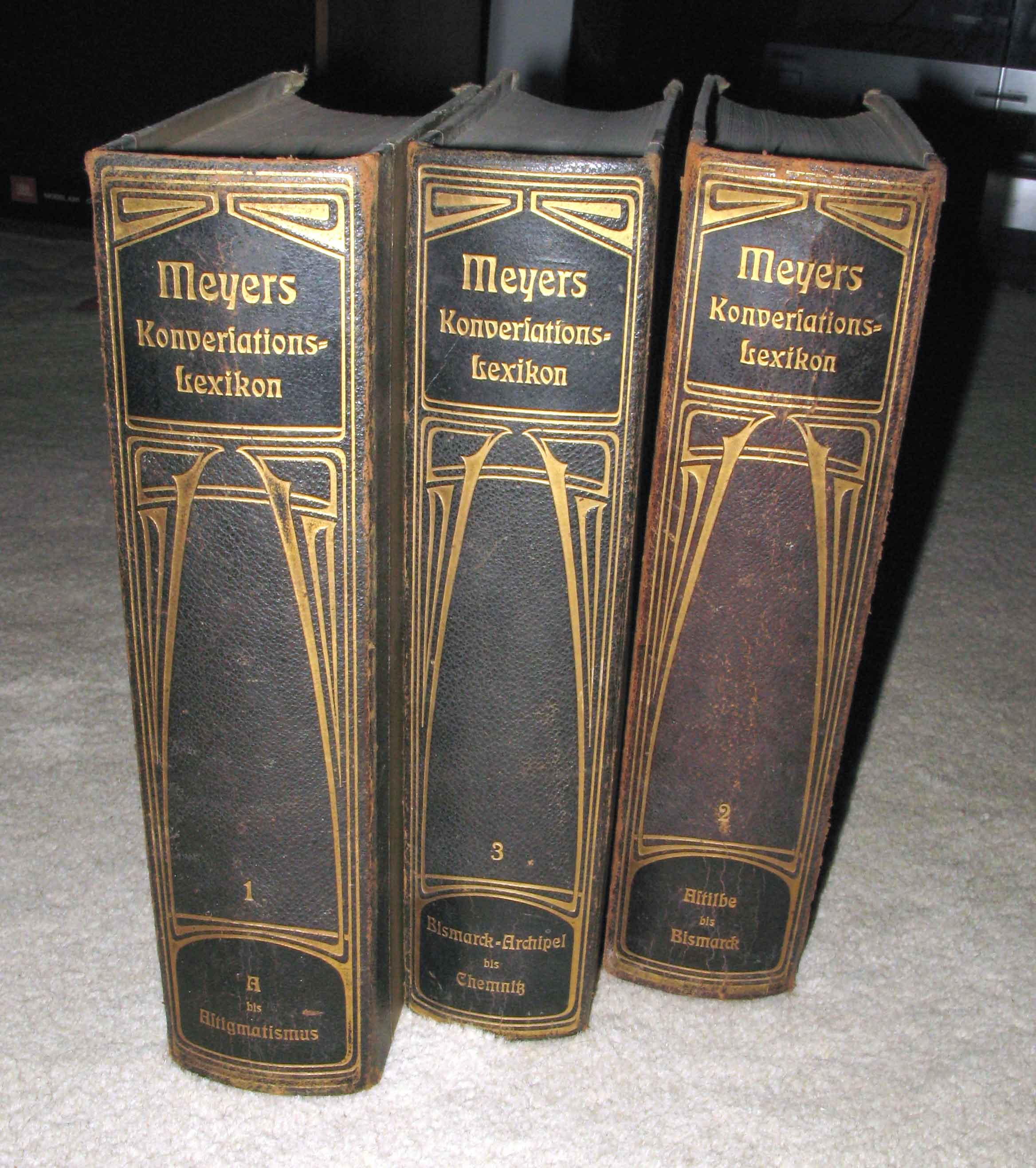 Déi dräi éischt Bänn vun der 6. Oplo vun 1902.